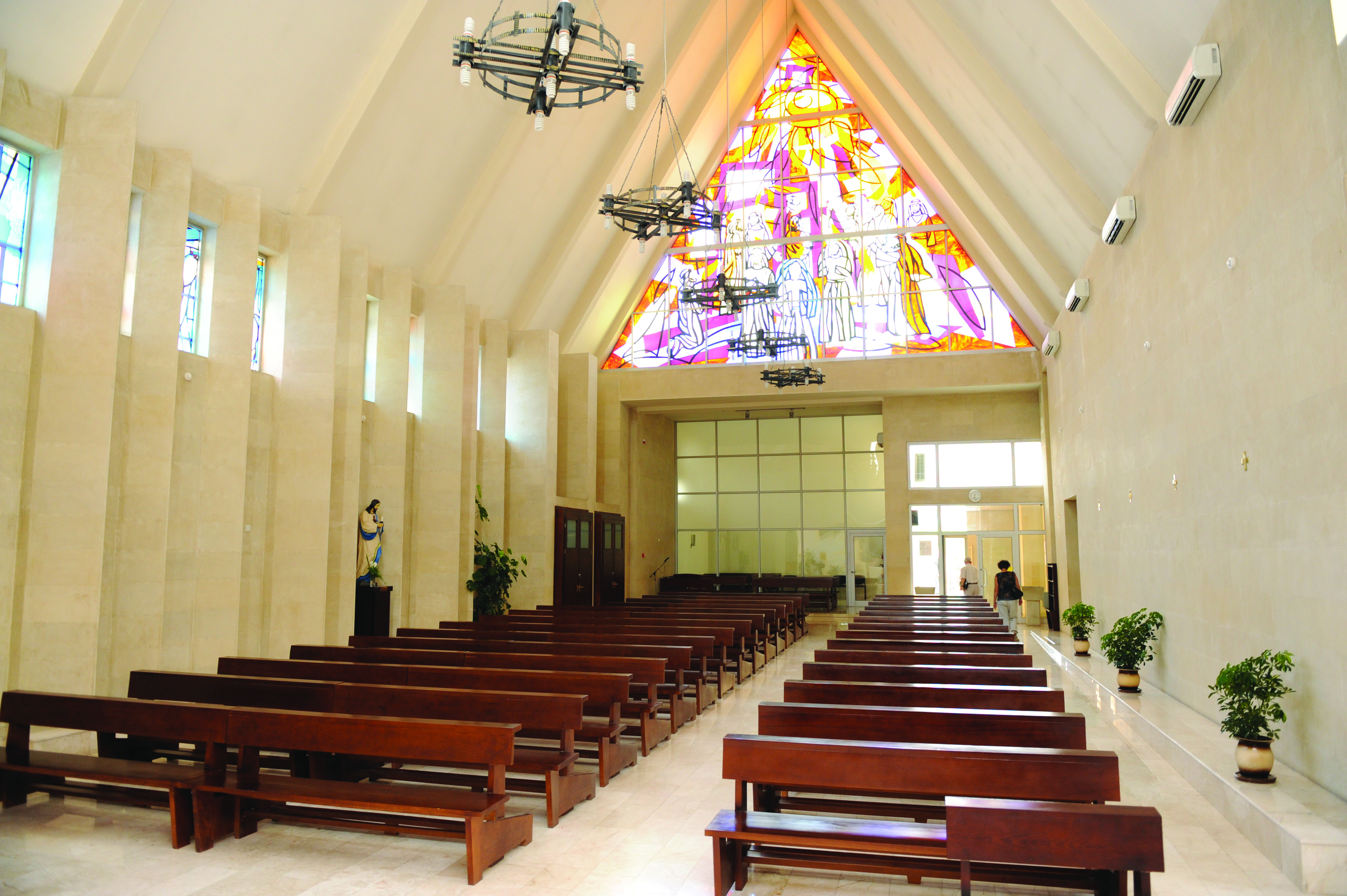 Bakıda Müqəddəs Məryəm kilsəsi nin interyeri